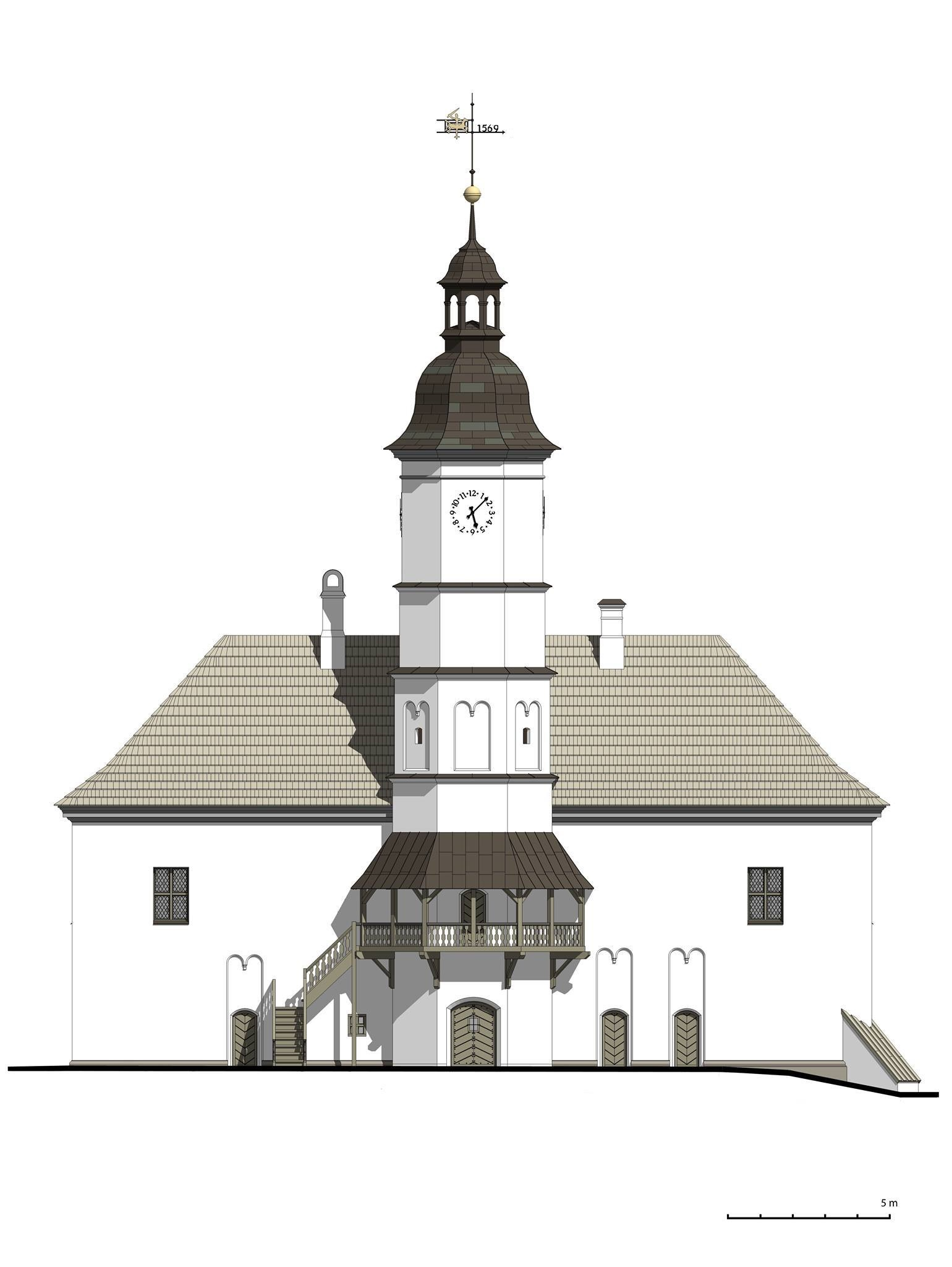 Šiaurinis fasadas Autoriai Žygimantas Buržinskas, Aurimas Širvys.